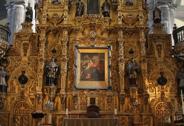 Nombre: Altar_del_ perdón Autor: Carlos Martínez Blando (2005) Otra información: Altar que se encuentra en la Catedral de México. Tomado con una cámara Canon Digital Rebel XT. Editado con Photostudio 5.5 (tamaño).